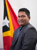 Ricardo Baptista, Abgeordneter des Nationalparlaments Osttimros